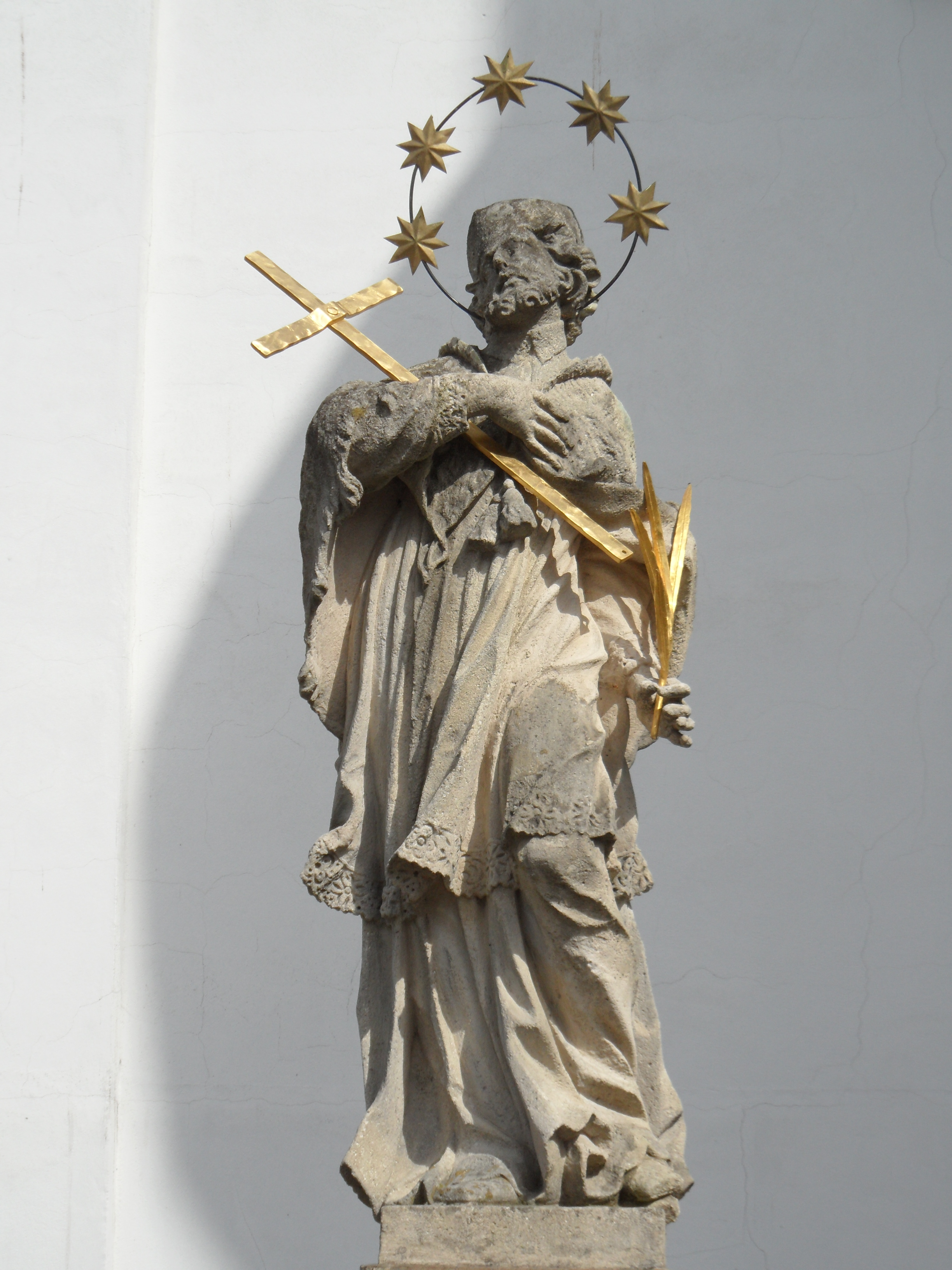 Kostel sv. Jiljí, Brno-Líšeň - socha sv. Jana Nepomuckého - Antonín Riga (1721)